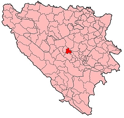 Prikaz općine Busovača u Bosni i Hercegovini